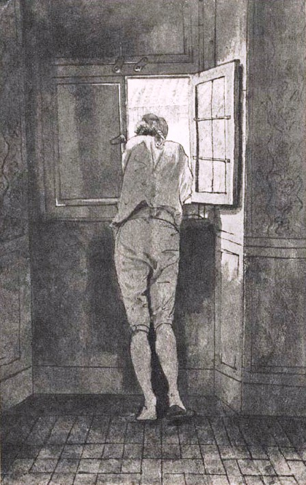 Goethe am Fenster der römischen Wohnung am Corso, 1787, Aquarell, 41,5 x 26,6 cm